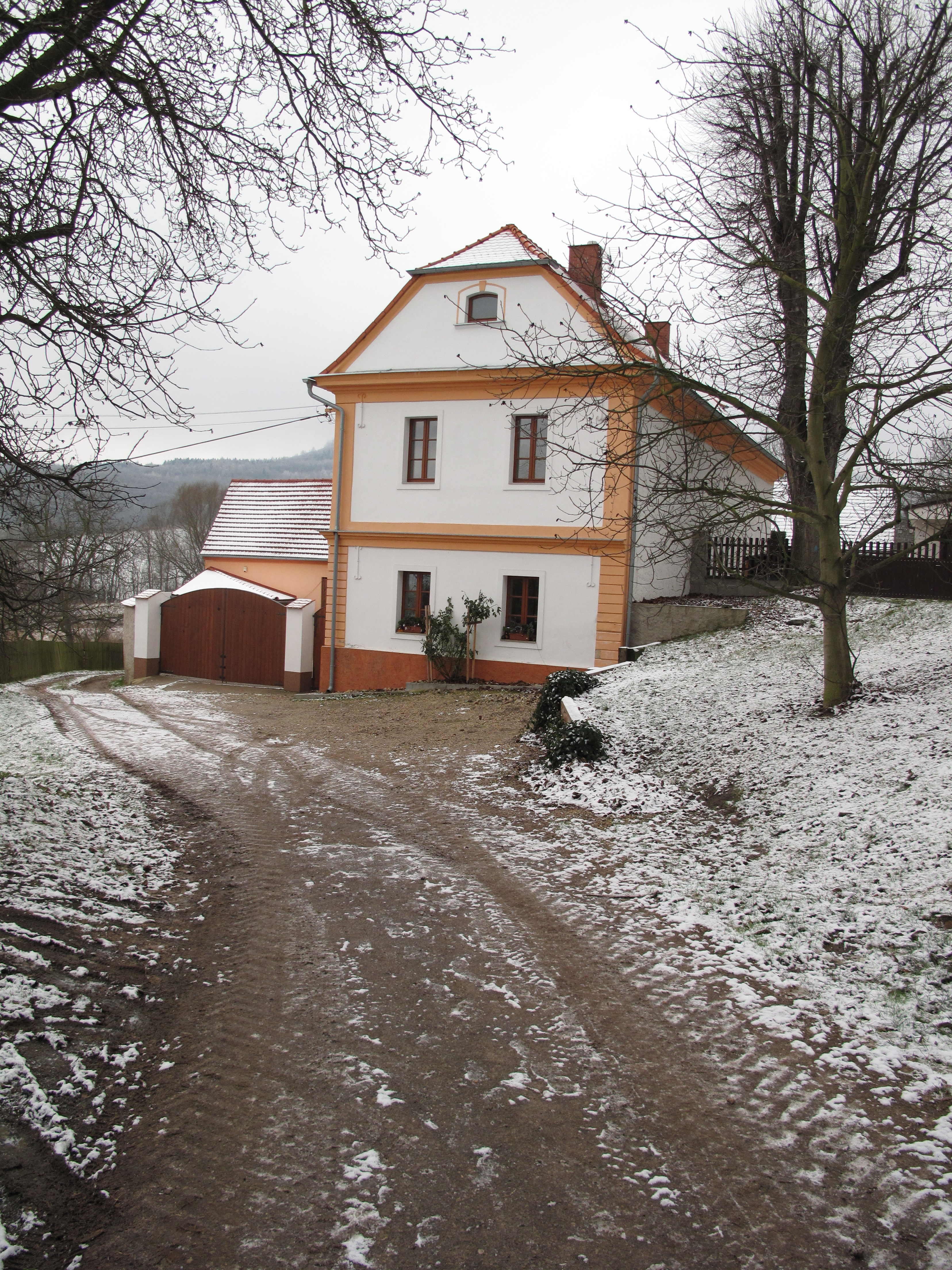 Statek v Mrsklesích. Okres Litoměřice, Česká republika.